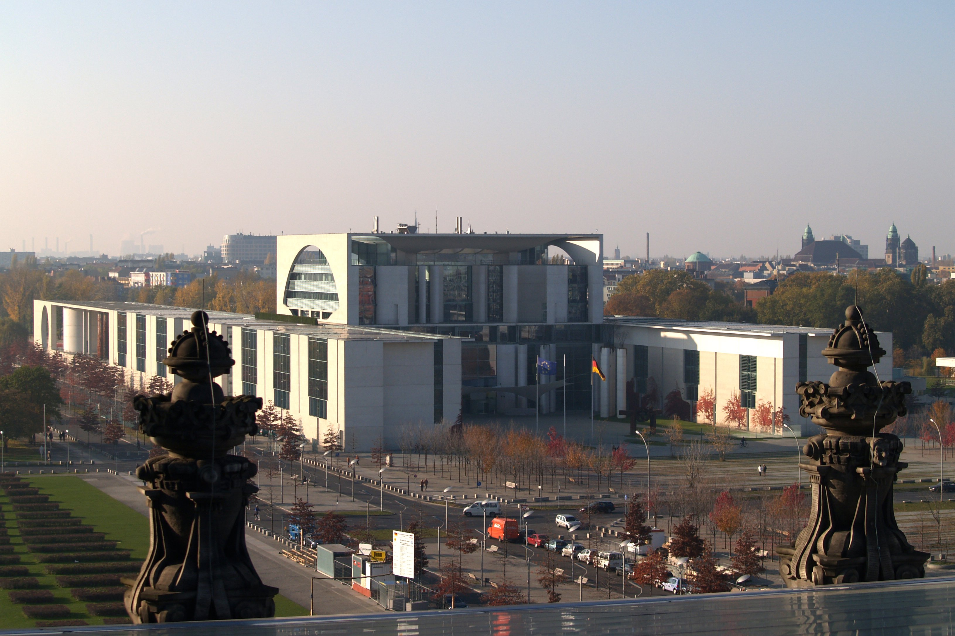 Bundeskanzleramt in Berlin from Roof of the Reichstag building